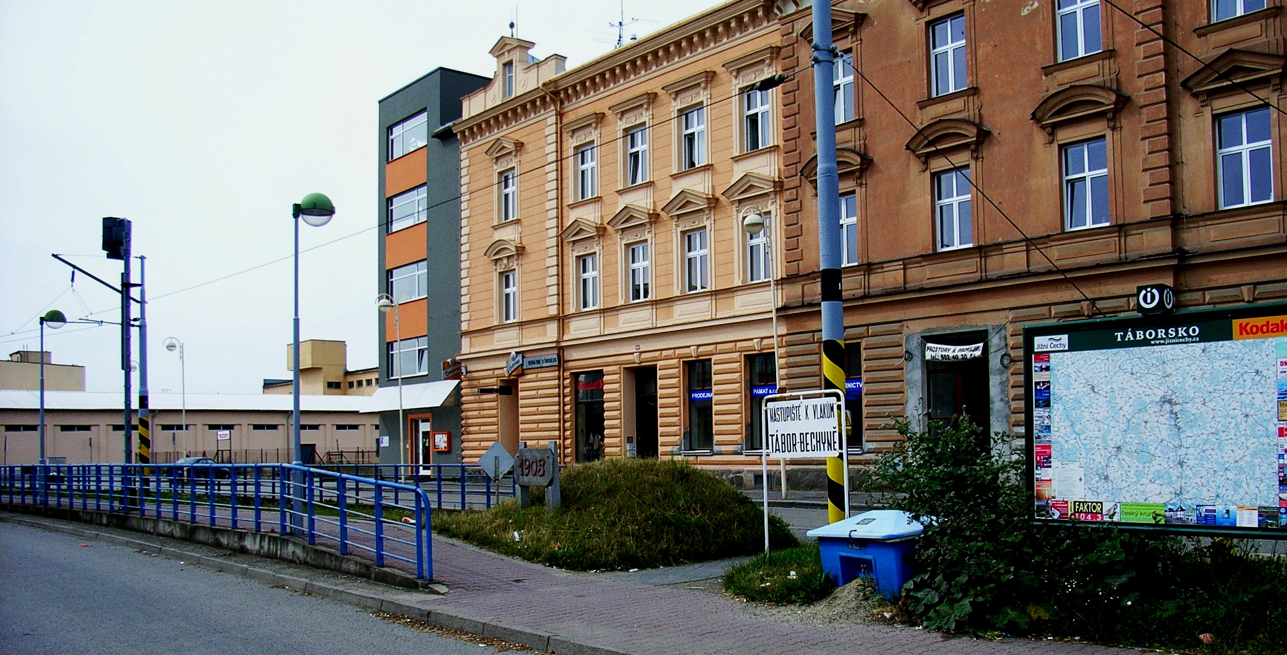 Nástupiště elektr. dráhy v Táboře – před budovou ČD.